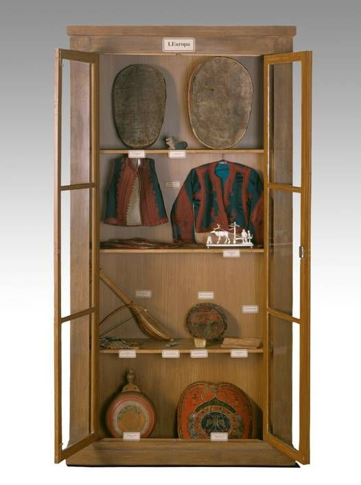 Der Kern, aus dem die Sammlungen des Museums Europäischer Kulturen hervorgegangen sind, ist der Schrank Europa. Das war ein bei der Transformation der Königlichen Preußischen Kunstkammer in ein Museum 1856 eingerichteter Schrank, in dem sich ein paar Objekte aus irgendwie randständigen europäischen Völkern befanden. Die beiden kostbarsten Stücke waren zwei Schamanentrommeln aus dem hohen Norden, aus dem Land der Samen. Die Samen waren wohl das Exotischste, was man in Europa finden konnte.